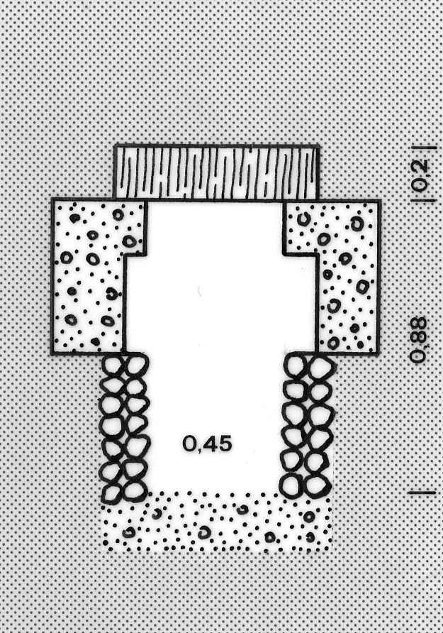 Planarchiv der Kantonsarchäologie Aargau Wasserführende römische / mittelalterliche Wasserleitung von Vindonissa Überarbeiteter Plan der schematischen Profilzeichnung nach Lauer-Belart, Vindonissa Filter Abschnitt; Kanal mit Trockenmauer zur Aufnahme des Hangwassers Archivierungsdatum: 17. 6. 2016 Literatur: - Rudolf Laur-Belart, Vindonissa: Lager und Vicus, 1935, Tafel 35 - Martin Hartmann: Vindonissa: Oppidum – Legionslager – Castrum, 1986, S. 90, Abb. 78 - Frontinus-Gesellschaft: Die Wasserversorgung Antiker Städte, Band 3, 2. Aufl. 1994, S. 54, Abb. 4